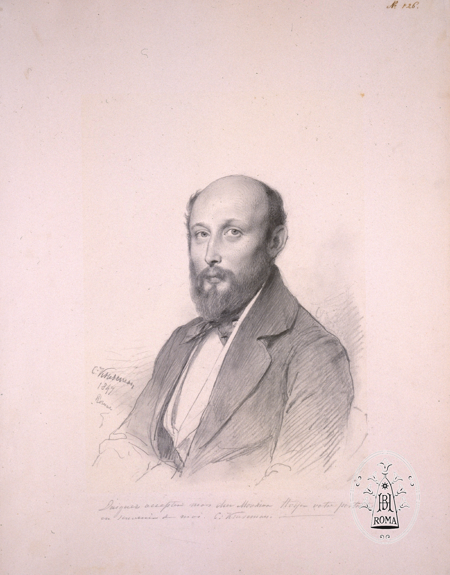 Porträt Wolf von Hoyer, Zeichnung von Cornelis Kruseman, Rom 1844